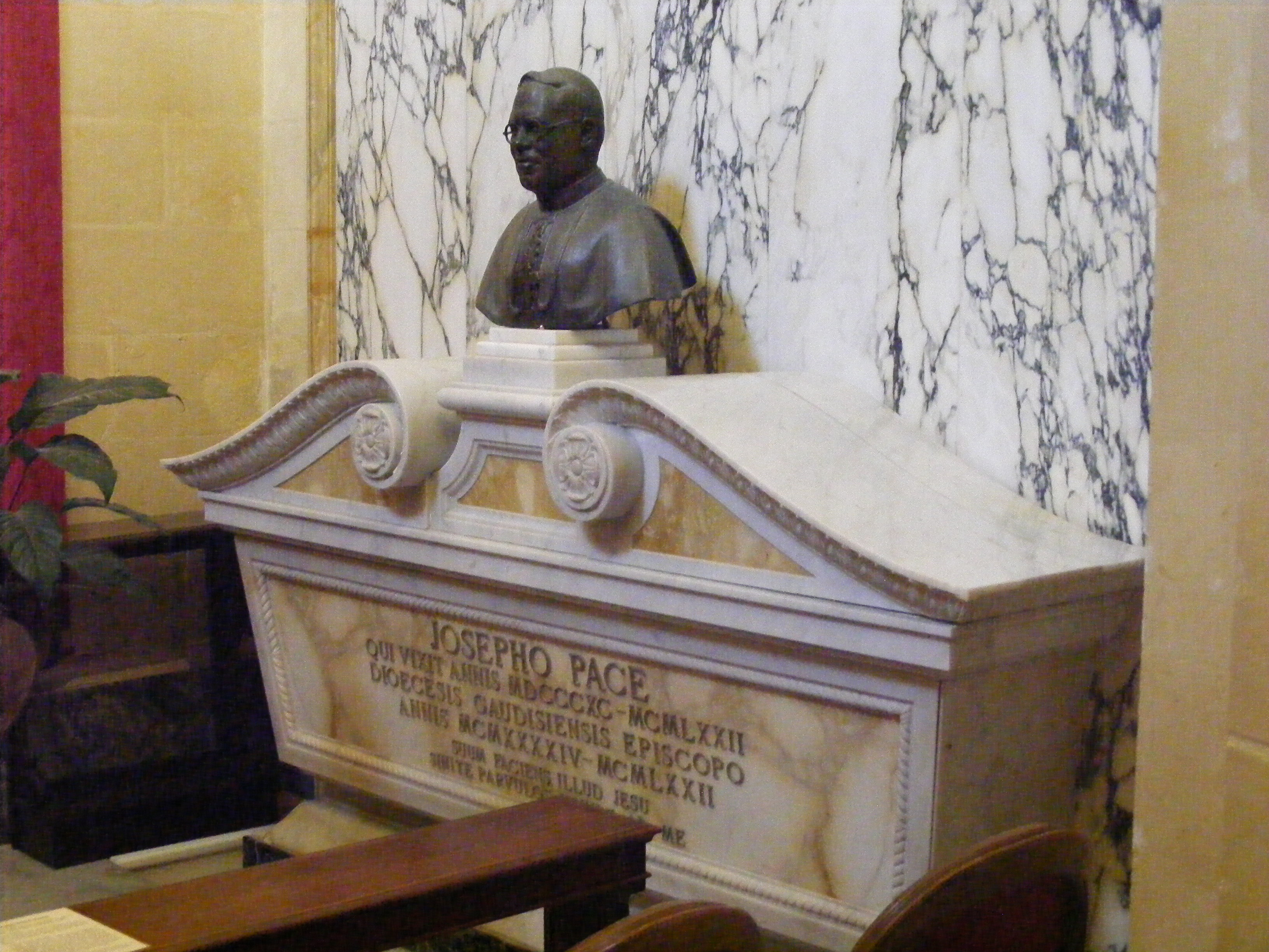 Grób biskupa Giuseppe Pace, szóstego biskupa Gozo, w kaplicy Najświętszego Sakramentu katedry na Gozo. Jego autorem jest Carlo Pisi, rzymianin (1962).